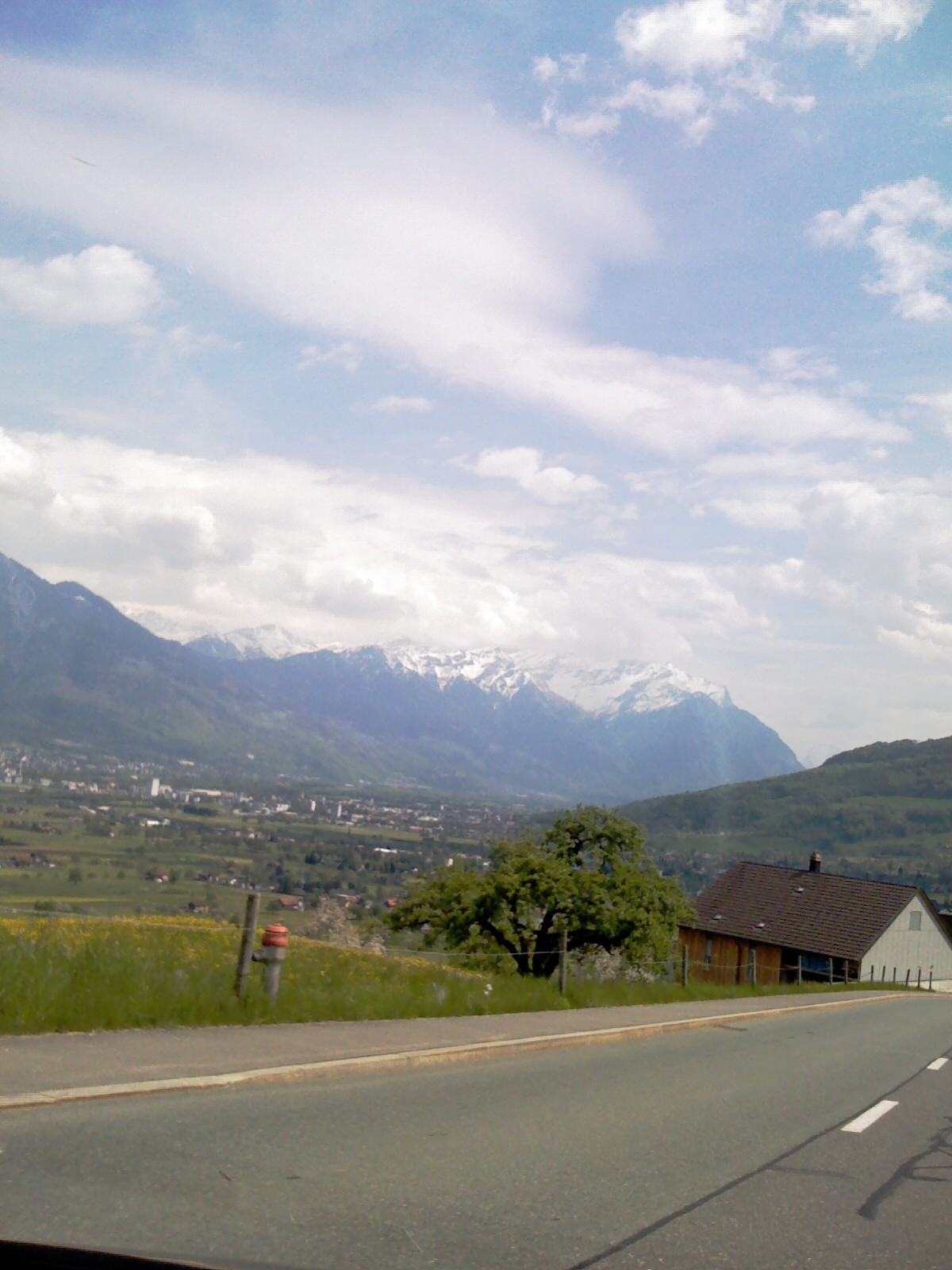 View to the Werdenberg Wahlkreis from the Wildhaus Passstreet - Rigardo al la Elektodistrikto Werdenberg de la Wildhaus-Pasejstrato